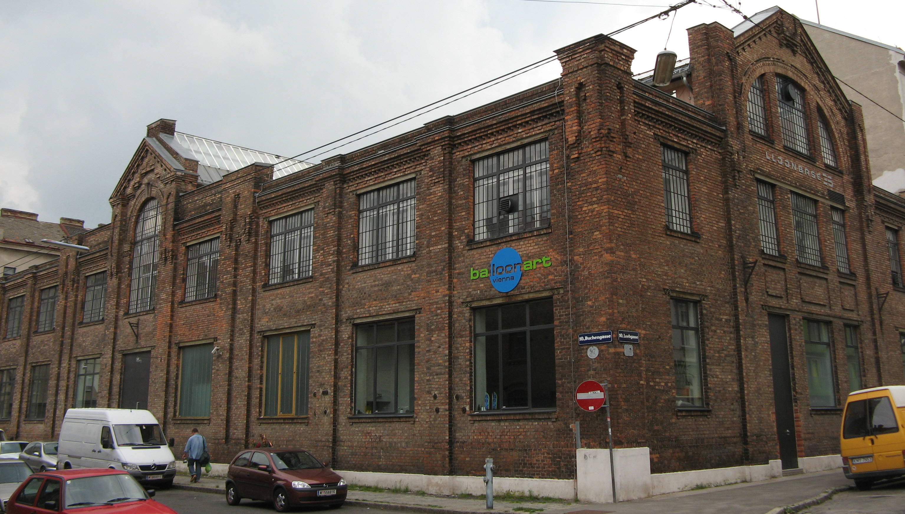 Ehemalige Maschinenfabrik M. Luzzatto (1906/09) von Ludwig Schmidl, Buchengasse 95-97, Wien-Favoriten